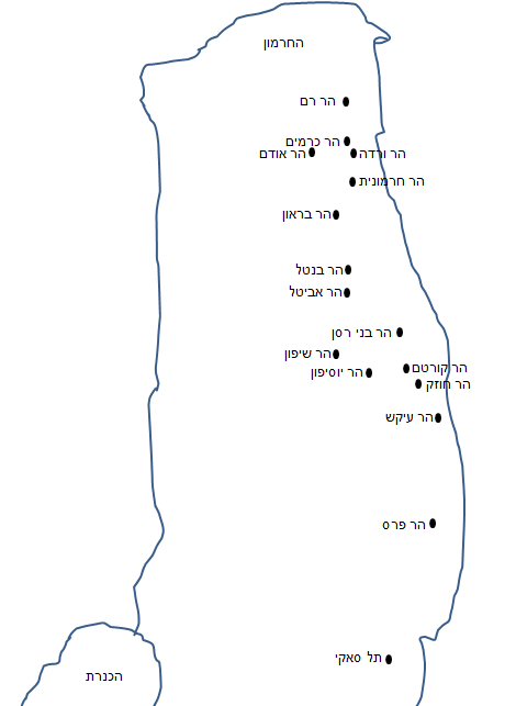 מפה של קו תילי הגעש